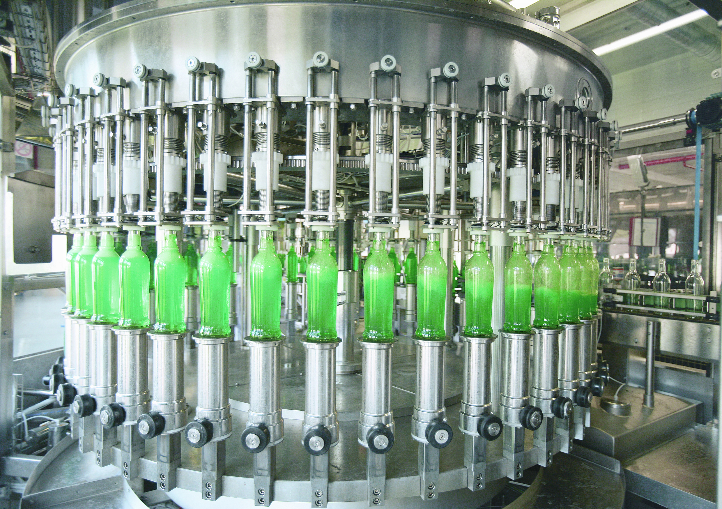 Flaschen Abfüllerei, Gleichdruckfüller mit Ringkessel